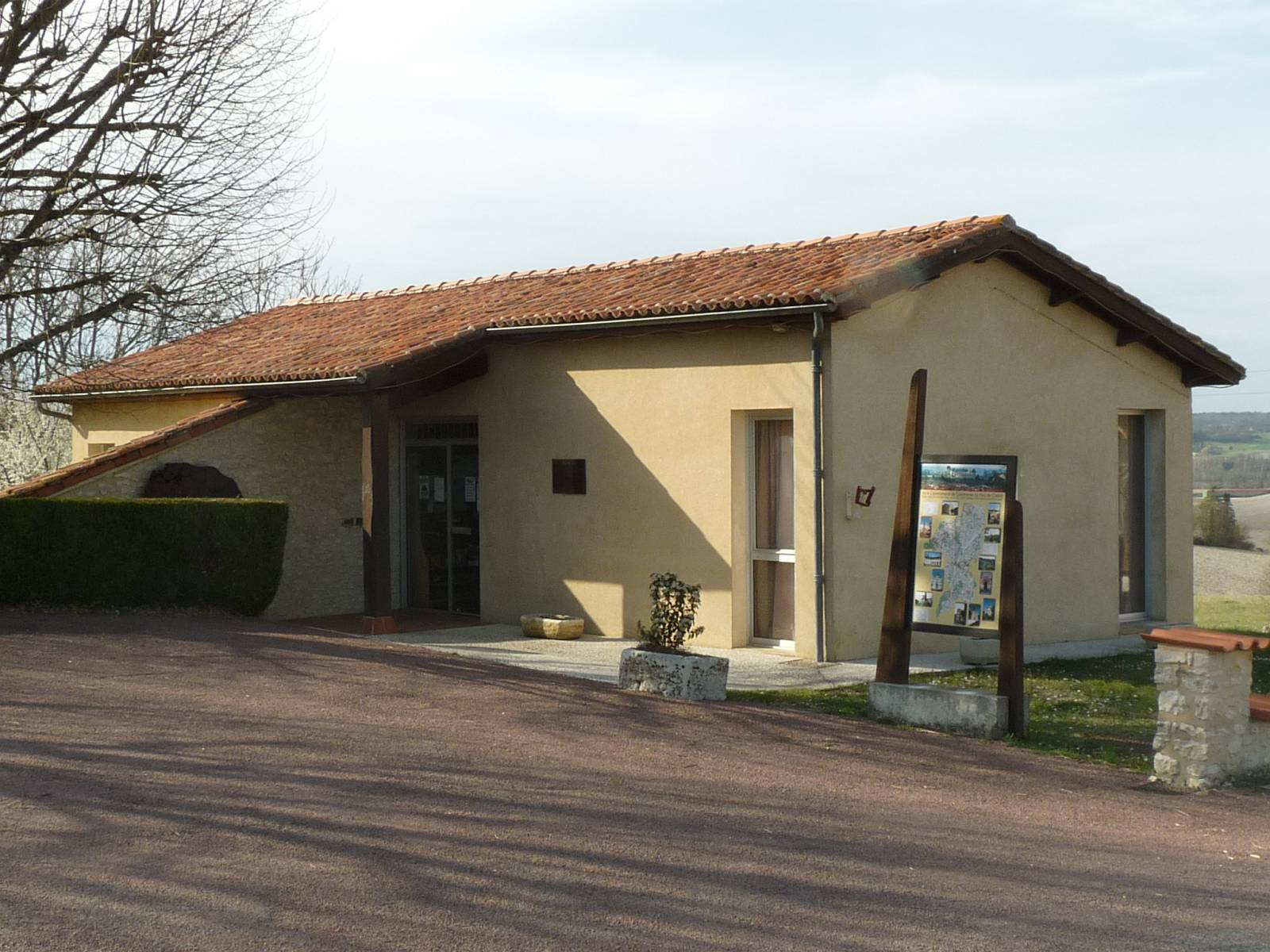 mairie d'Orival, Charente, France